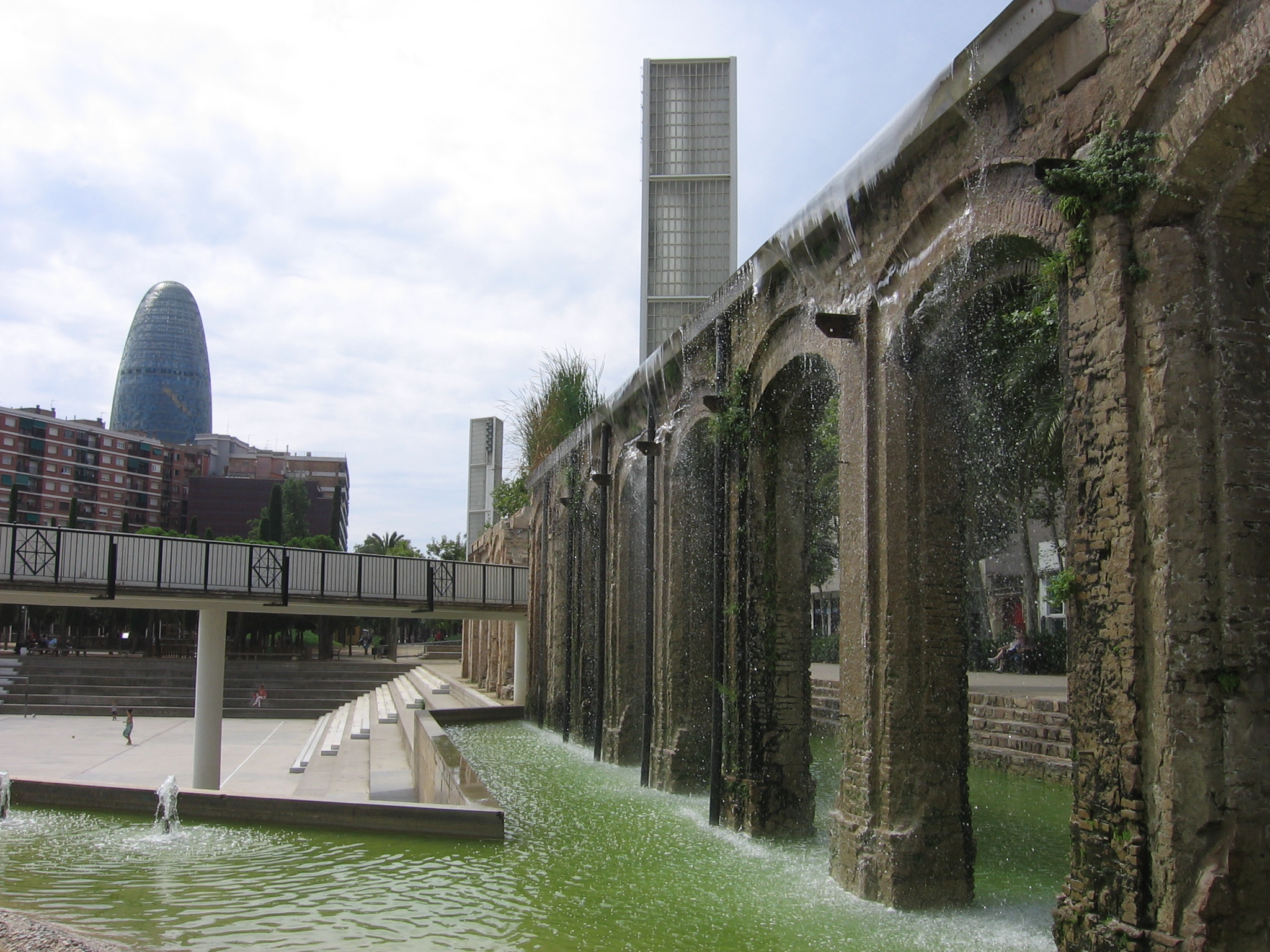 Parque del Clot.